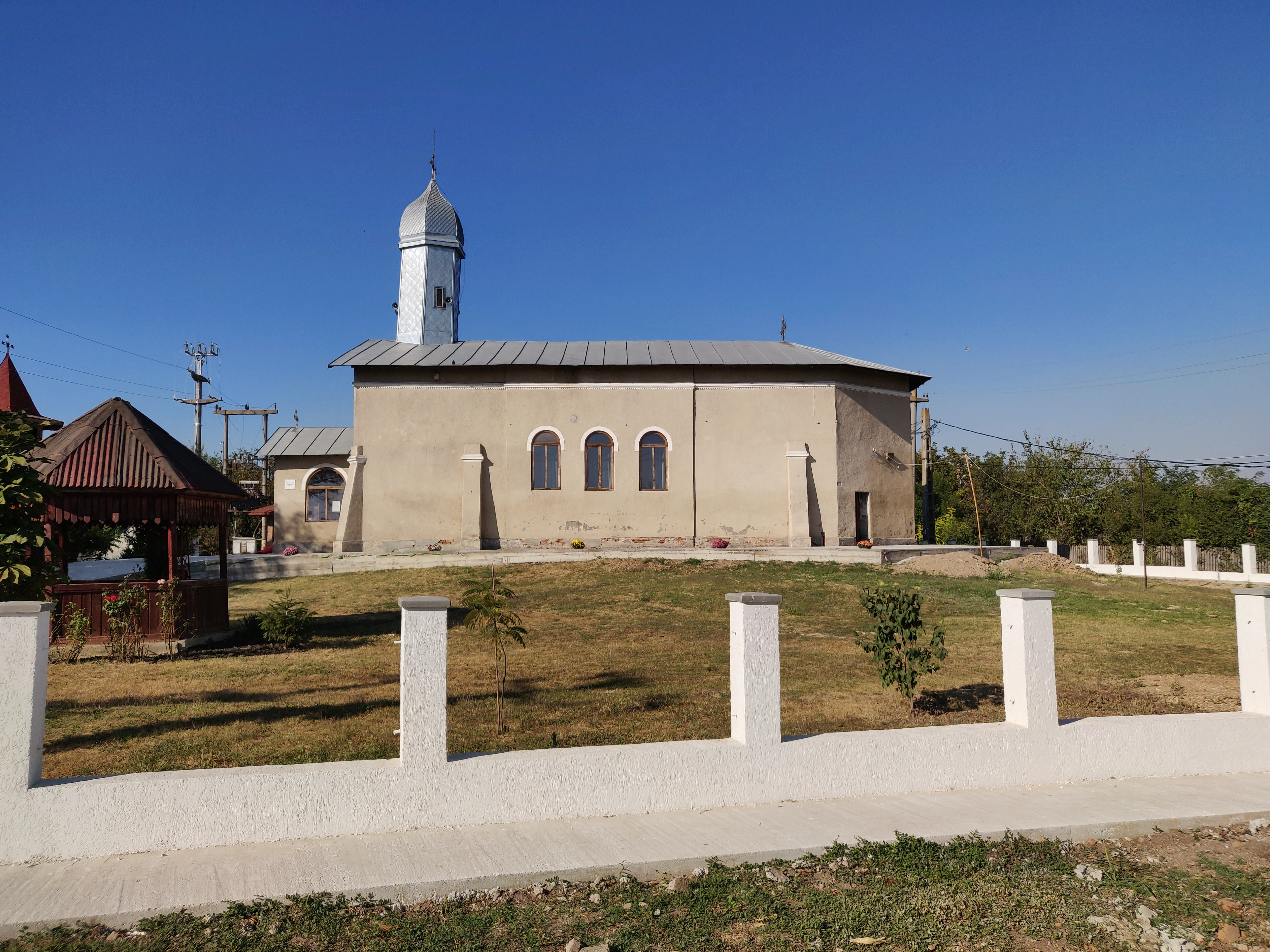 Biserica „Sf. Nicolae”